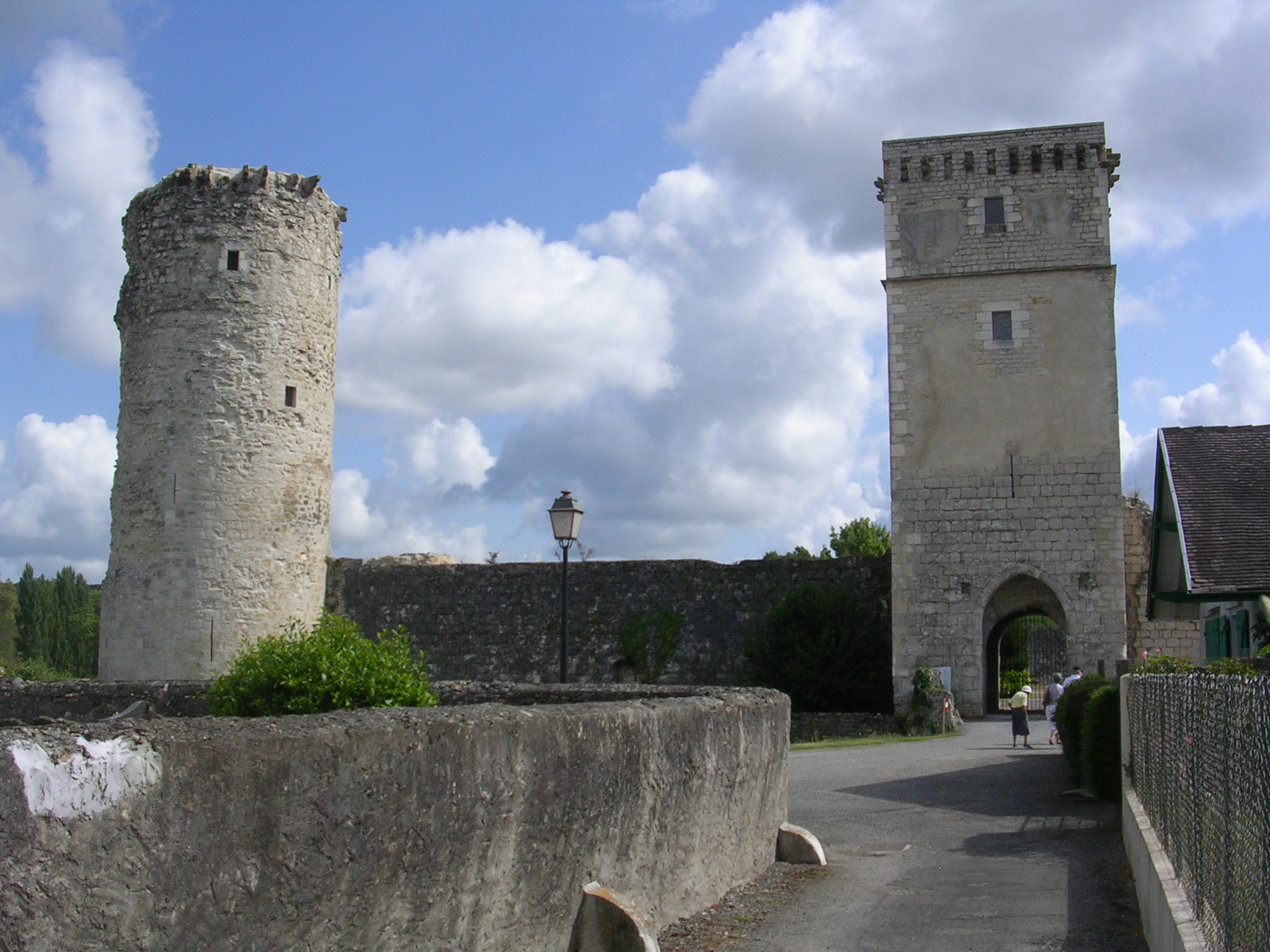 Château de Bellocq